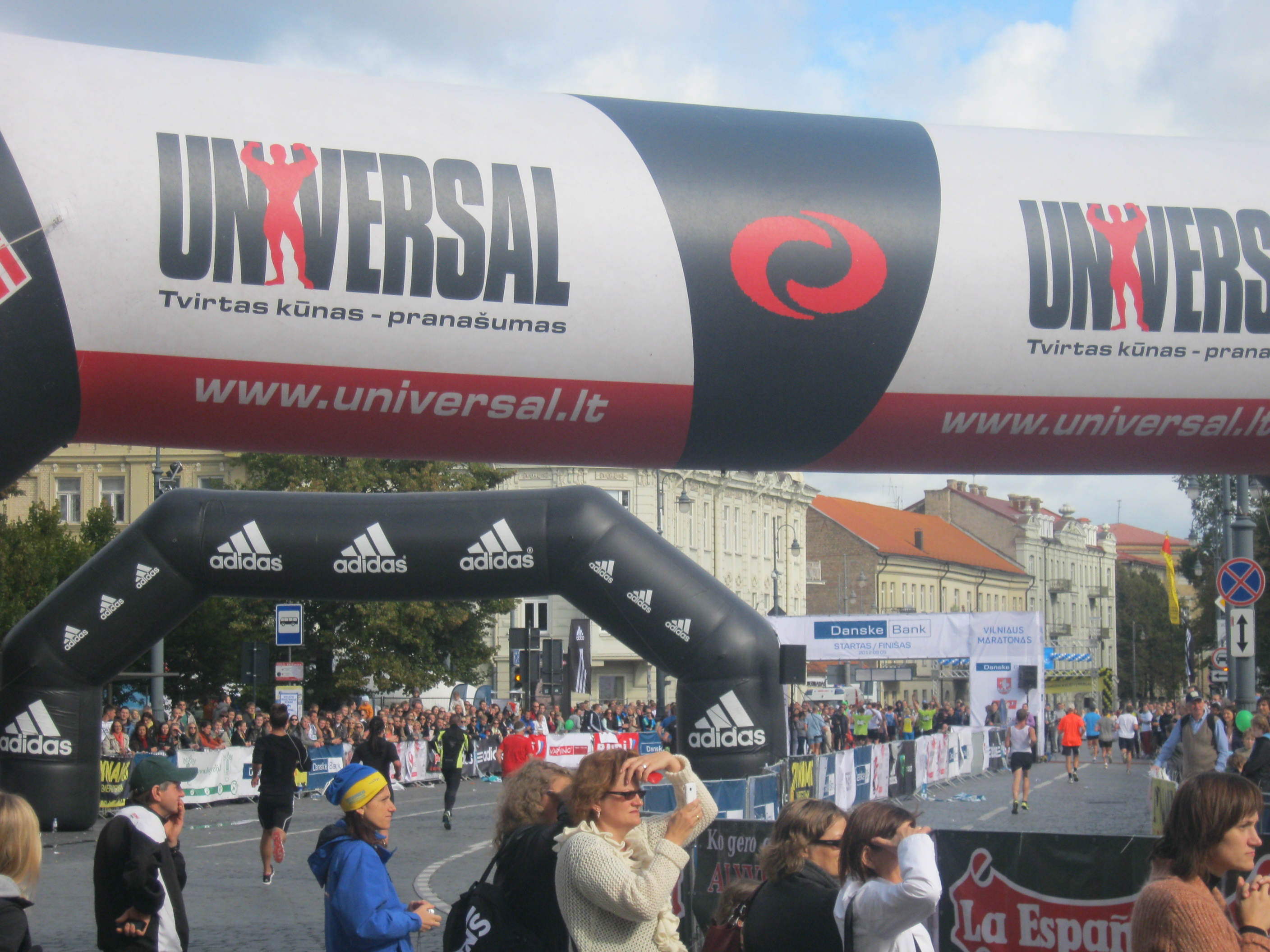 Vilniaus Maratonas